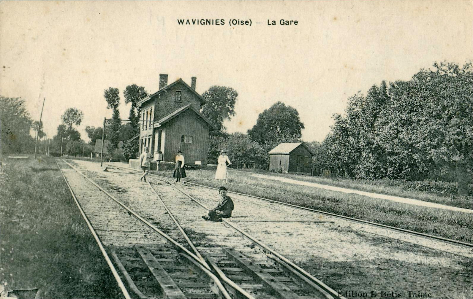 Carte postale éditée par E. Bétis, Tabac :WAVIGNIES - La GareIl s'agit d'une gare de la ligne de chemin de fer secondaire à voie métrique Ligne Estrées-Saint-Denis - Froissy - Crèvecœur-le-Grand